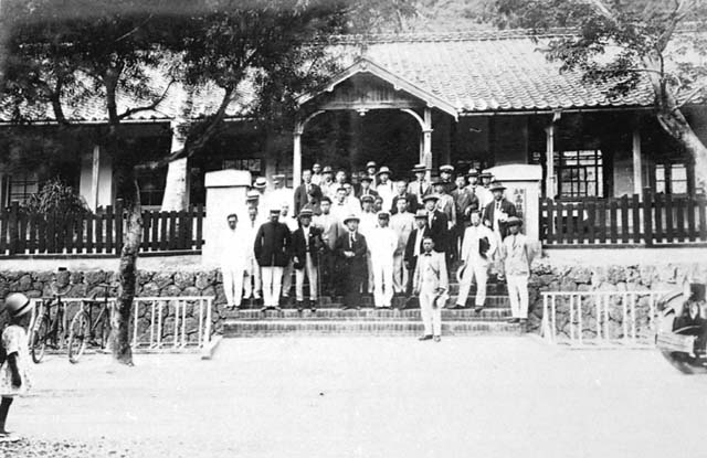 中文（台灣）: 西元1916年（大正5年），旅居打狗的日本僑民成立「文庫協贊會」，照片中的建築位於今鼓山區武德殿西方。1927年（昭和2年）搬離至高雄公會堂 日本全國圖書館協議會會員一行於昭和四年9月24日至10月10日止來臺視察，共分二批，第一批於9月24日搭乘朝日丸在基隆入港，當日停宿臺北，第二批於9月27日搭乘蓬萊丸基隆入港，當日停宿北投，10月2日首先到屏東的臺灣製糖會社視察，參拜阿猴神社，公園、蕃屋、農業視驗場圖書館，並接受午餐的招待，回到高雄從棧橋港內一巡、圖書館視察、海水浴場到壽山參拜高雄神社後乘車到臺南後投宿。 圖為會員一行於高雄市立圖書館前合影，本資料出自「臺灣之旅」(1929)。